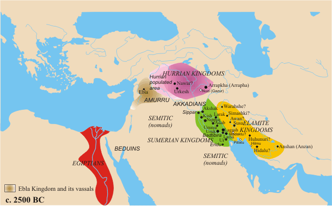 Урадлівы паўмесяц у сярэдзіне III тысячагоддзя да нашай эры.